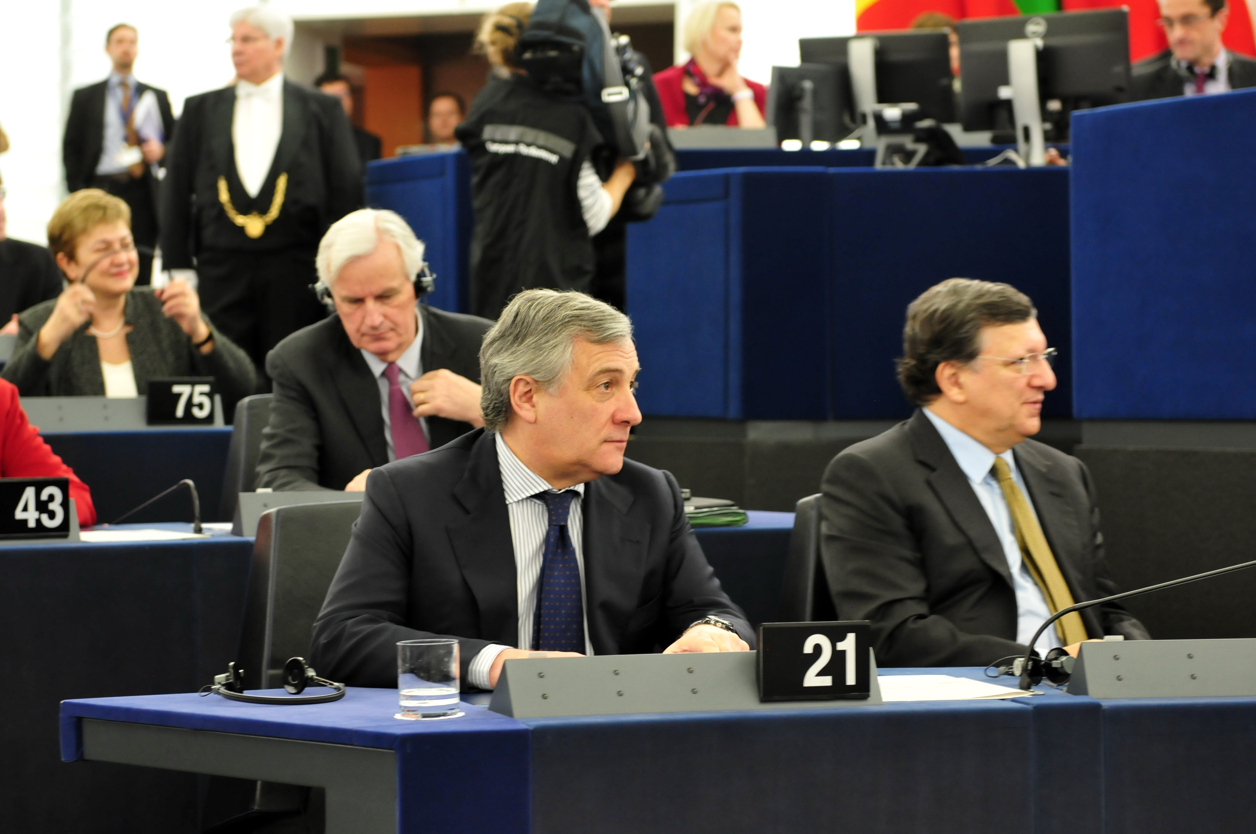 im Europaparlament; Blick vom Präsidium in den Plenarsaal European Parliament 2014 3.–7. February 2014, StrasbourgThis photo has been created within the project "WIKI loves parliaments / European Parliament". Usage and Help If you have any questions concerning this picture or how to use it, feel free to Personality rights warningAlthough this work is freely licensed or in the public domain, the person(s) shown may have rights that legally restrict certain re-uses unless those depicted consent to such uses. In these cases, a model release or other evidence of consent could protect you from infringement claims.